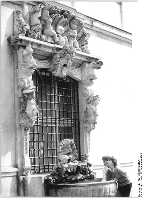 Dresden, Brunnen ADN-ZB Häßler 17.9.1985 Dresden: Schönes Detail- Einer der frühesten Dresdner Hofbrunnen, aus der Zeit um 1718, gehört zum Haus des Goldschmieds J. Melchior Dinglinger an der Frauengasse 9. Aus dem 1945 zerstörten Gebäude wurden Teile des Brunnens geborgen und mit Ergänzungen an der Rückseite vom Hotel Gewandhaus angebracht. Das in Muschelform ausgebildete Brunnenbecken trägt Putten und einen grotesken Männerkopf. Das Fenster rahmen Pflaster mit Konsolen aus denen Putten wachsen. Über dem Schlußstein befindet sich eine doppelt geöffnete Muschel mit Perle.